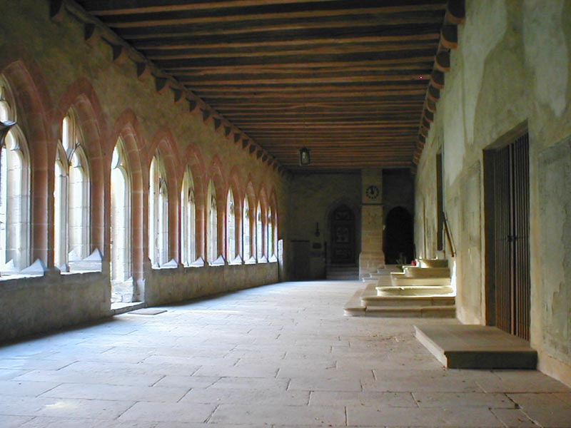 Kreuzgang der Stiftskirche in Bad Wimpfen im Tal